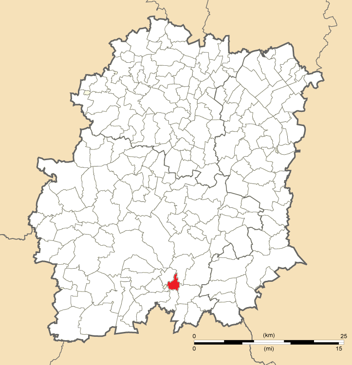 Carte de position de Bois-Herpin en Essonne (91)